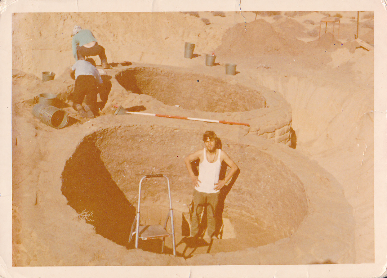 חפירות ביר אל עבד בסיני